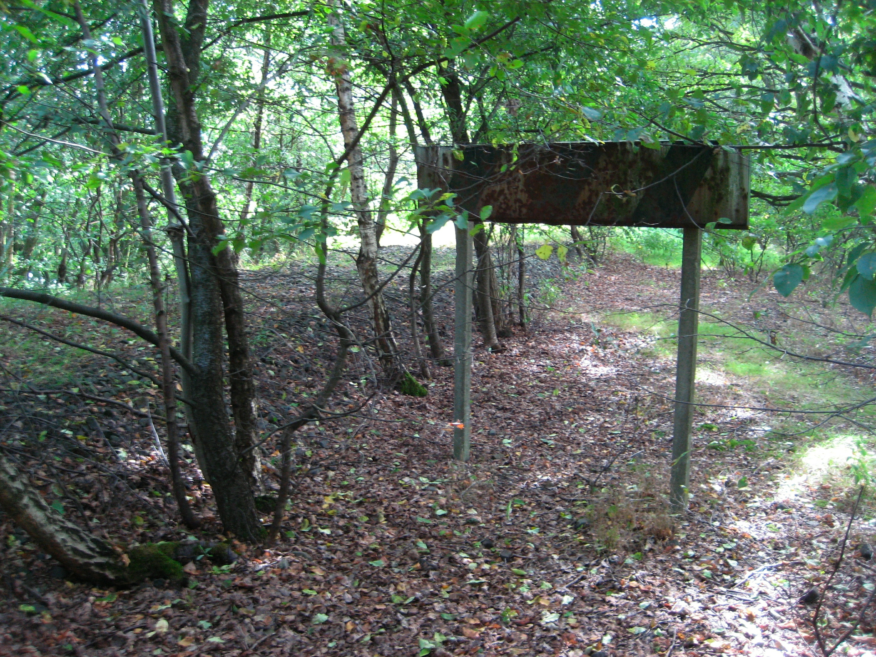 Altes Schild am ehemaligen Bf. Wengern West der Elbschetalbahn, Ende Mühlenweg, Wetter-Wengern